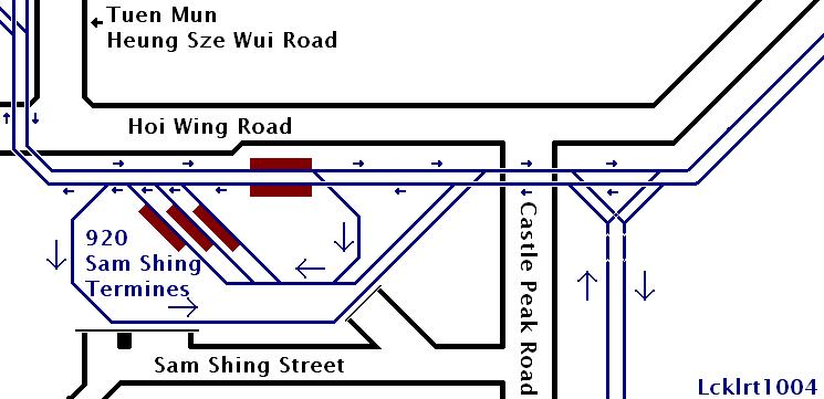 中文（香港）: 三聖總站的原軌道佈置圖（有置樂支線和黃金海岸支線）。